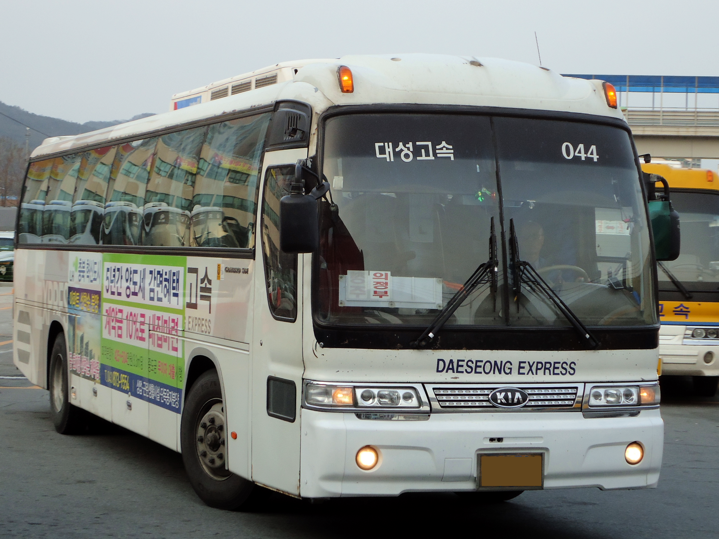 대성고속 그랜버드 SDⅠ슈퍼그린필드